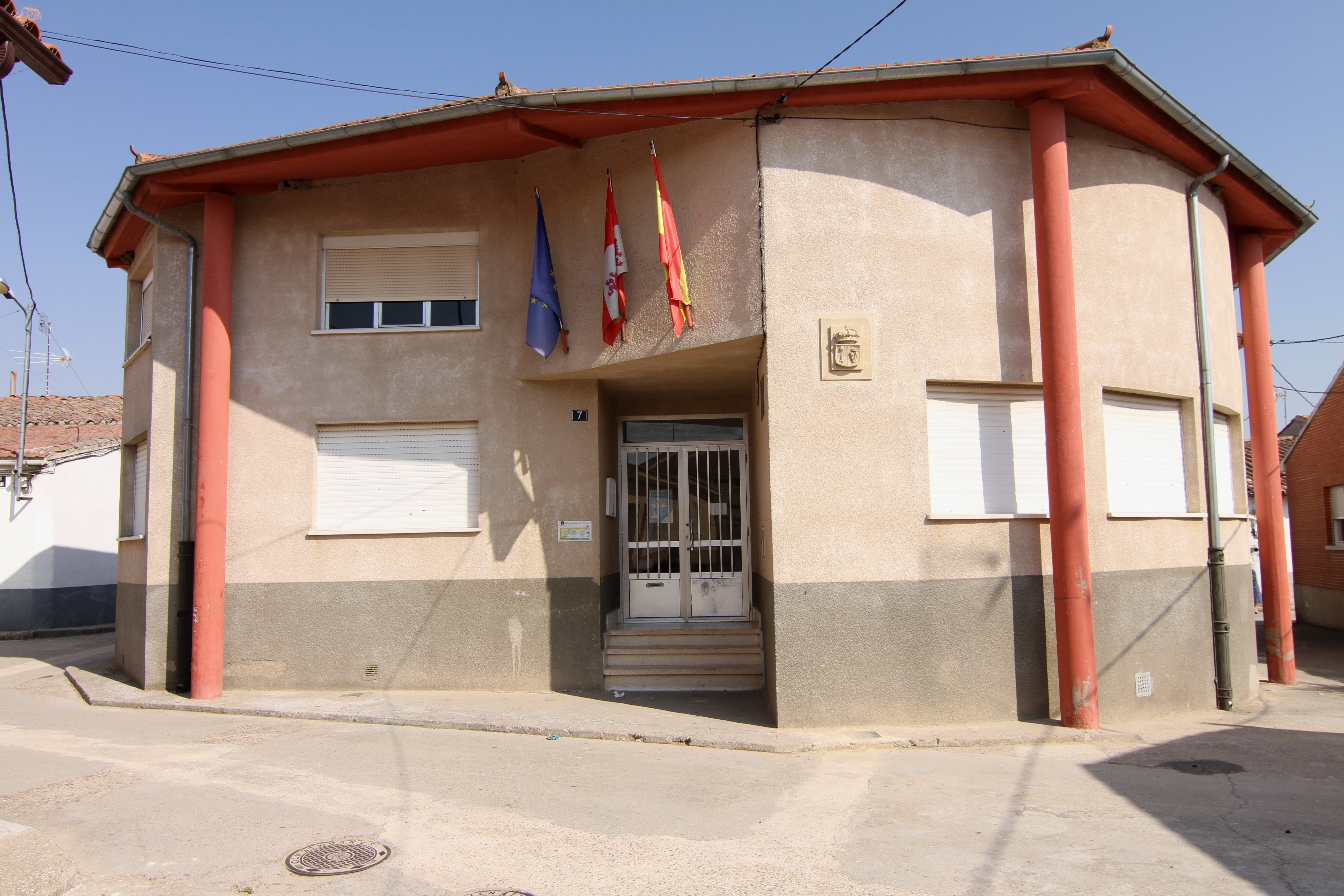 Ayuntamiento de Pitiegua